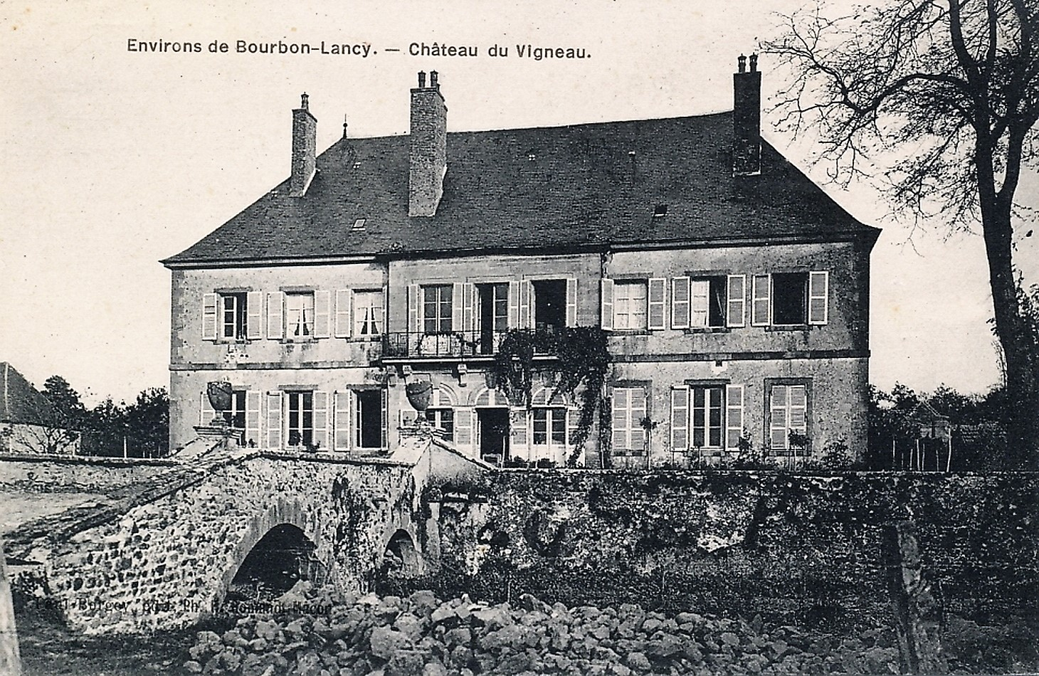 Le château du Vignault de Bourbon-Lancy Saône-et-Loire .